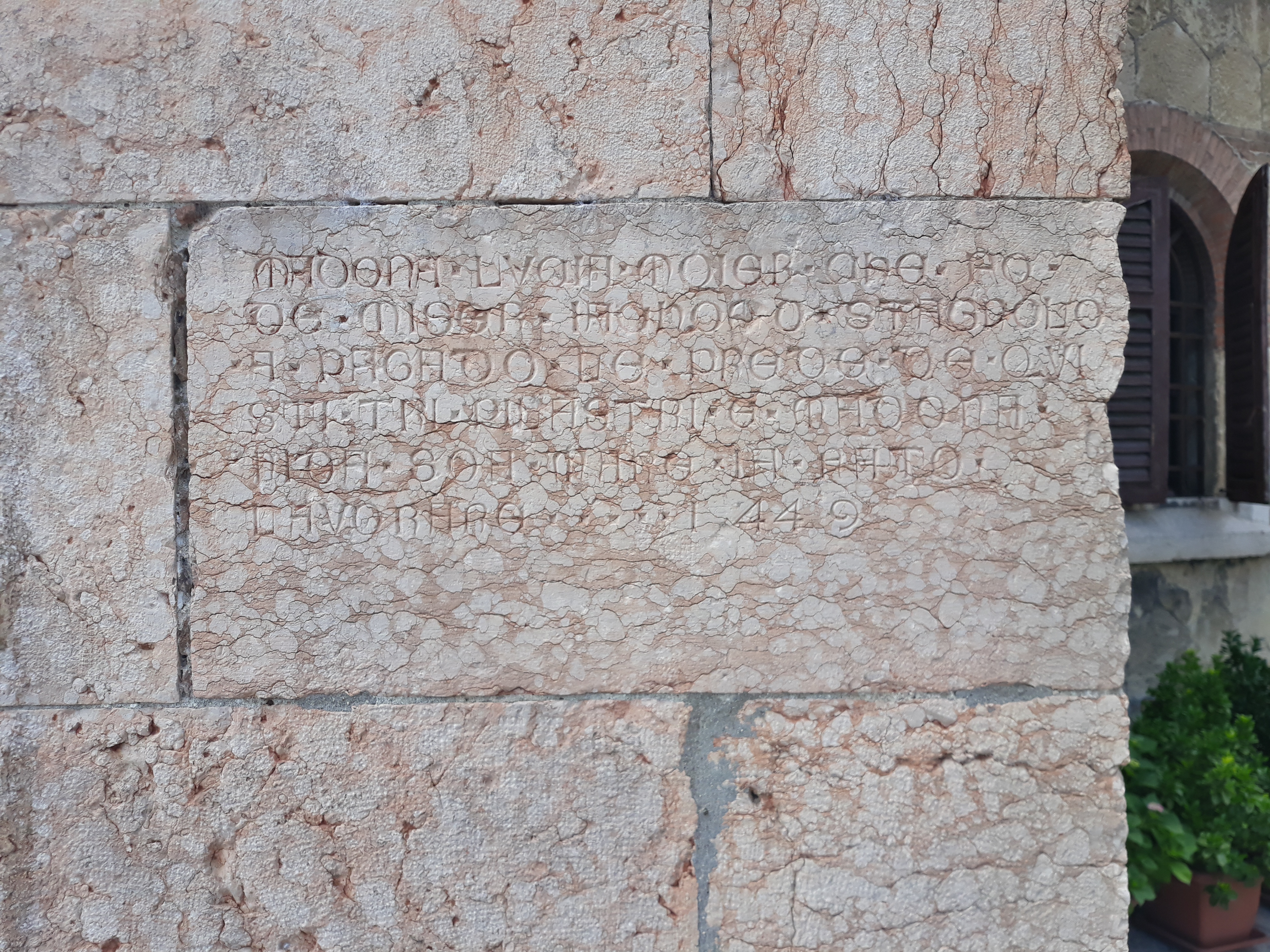 Iscrizione posta sulla facciata della Chiesa di San Tomaso Cantuariense